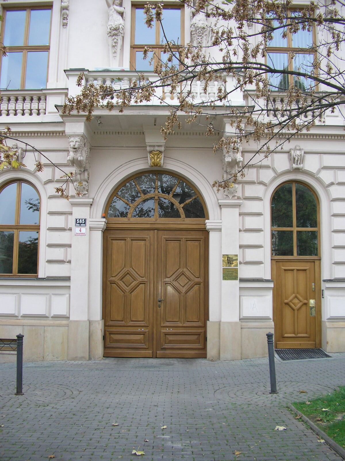 Nejvyšší státní zastupitelství v Brně